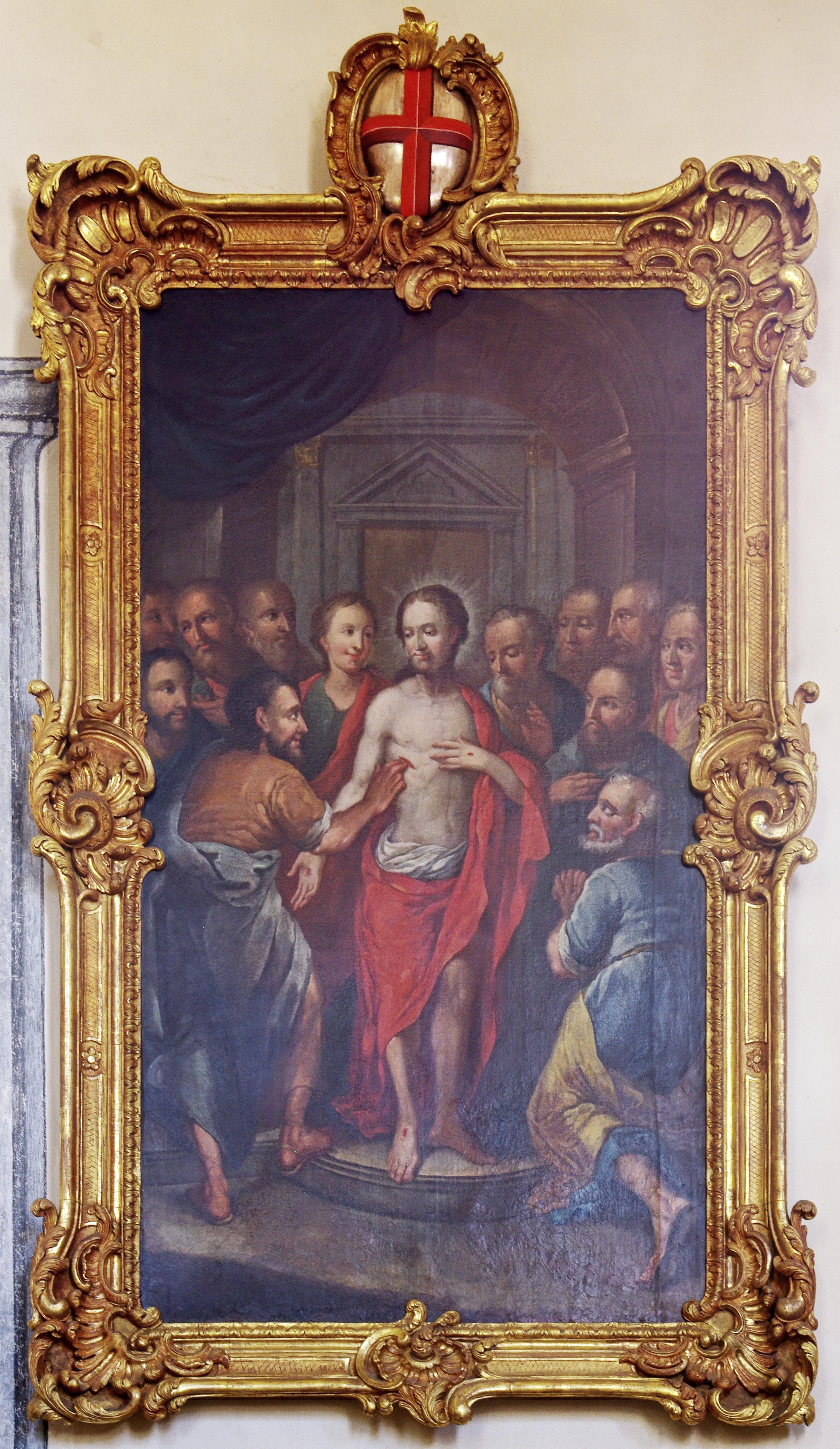 Pfarrkirche St. Thomas in Freiburg Betzenhausen